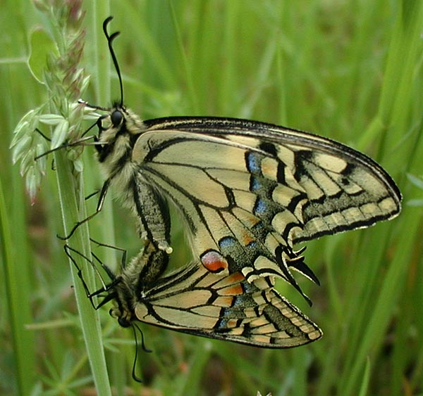 Schwalbenschwanz (Papilio machaon), Paarung, aufgenommen im hohen Gras auf einer Wiese am Hornberg in Buseck